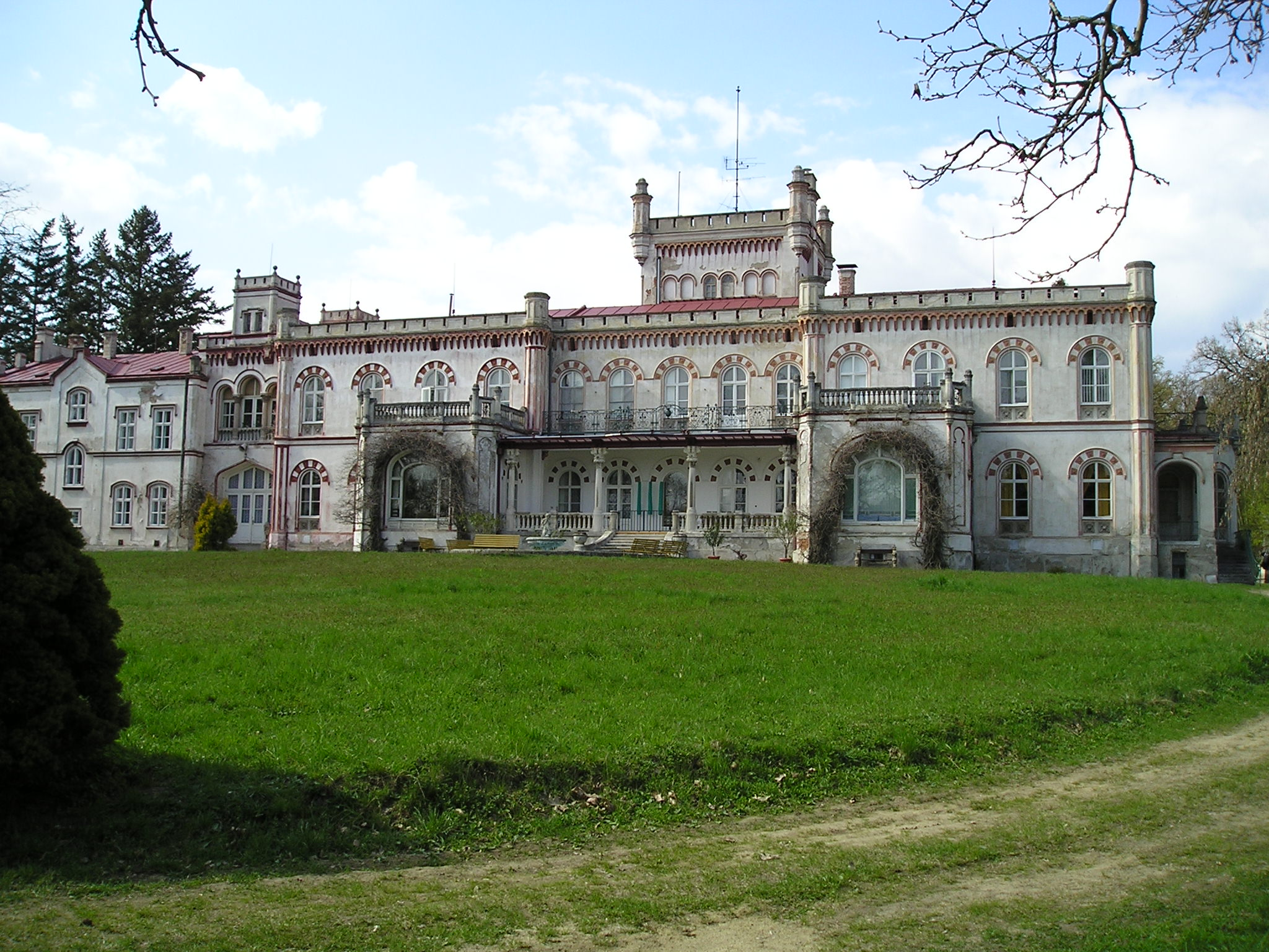 Zámek nový, s omezením: bez hospodářského stavení Jevišovice, V od měst. 127, Jevišovice